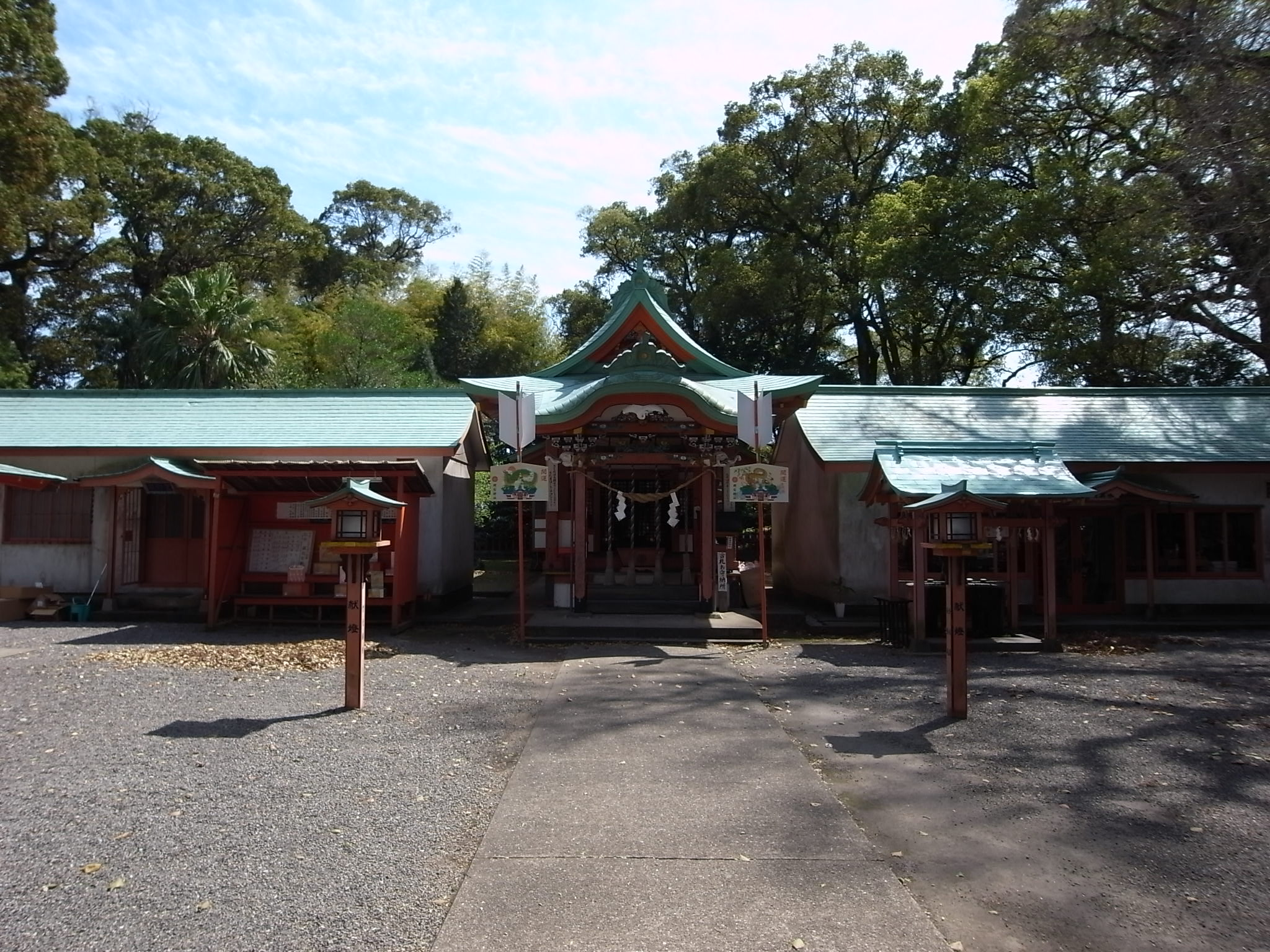 鹿児島県指宿市、揖宿神社勅使殿